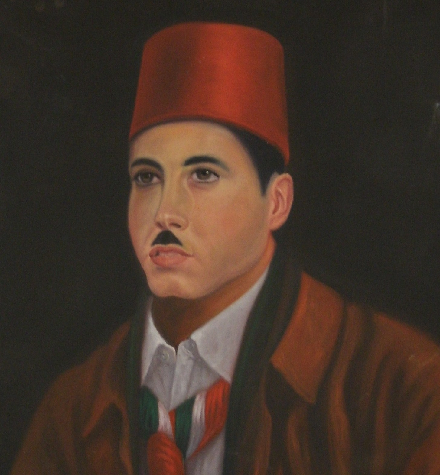 Mohamed Bouras, fondateur des Scouts Musulmans Algériens